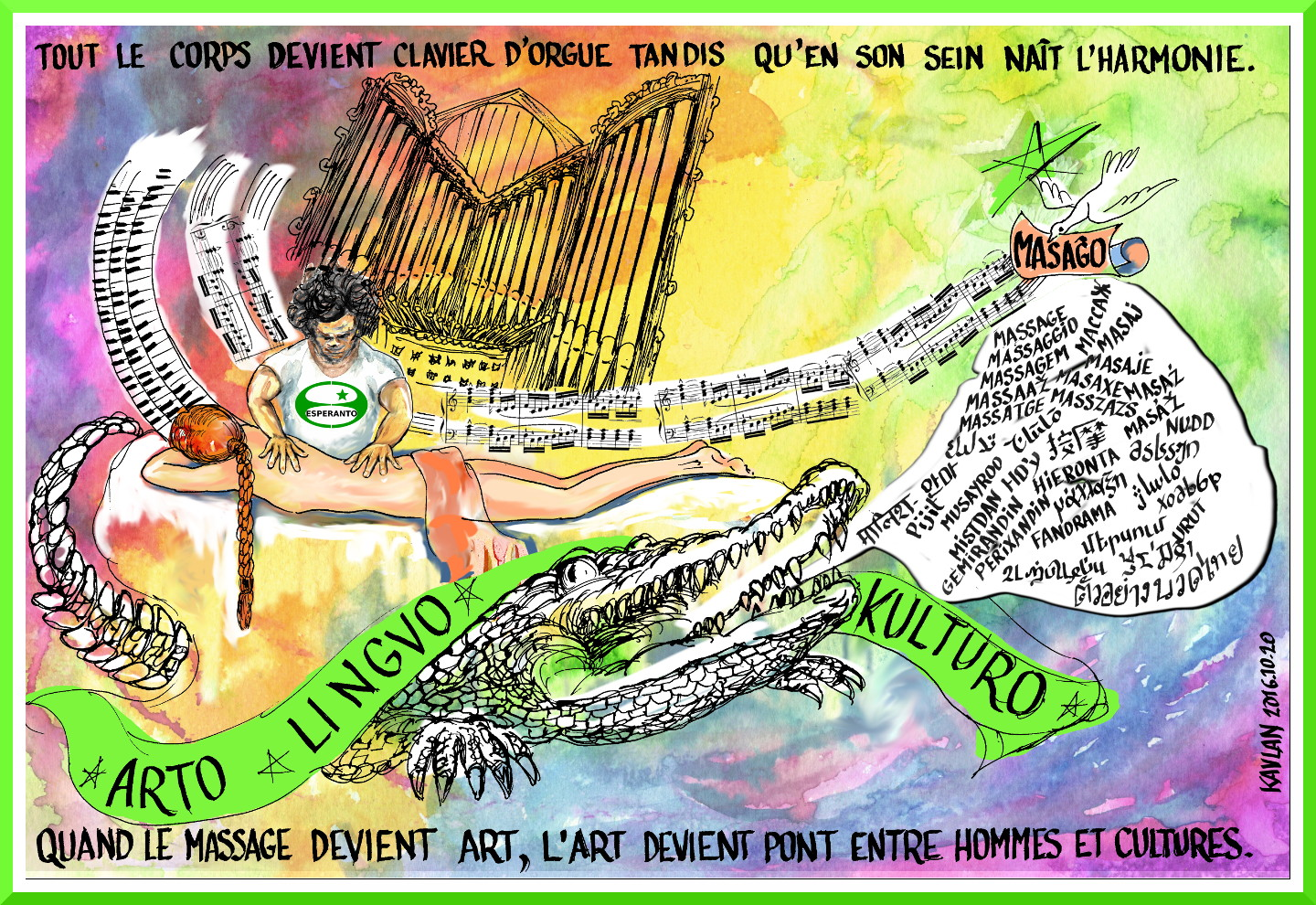 Ilustraĵo de la frazo "Quand le massage devient clavier…" en la franca